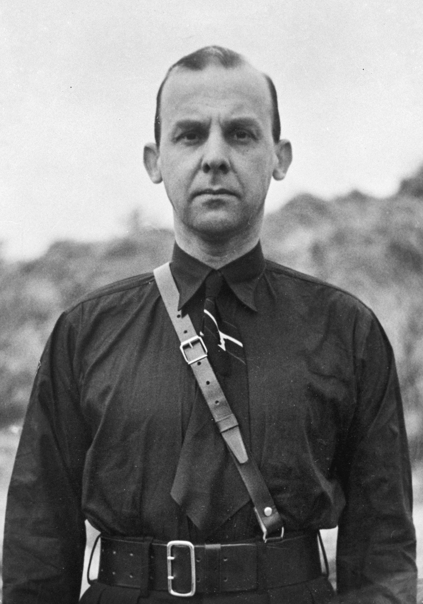 M.M. Rost van Tonningen, NSB-leider (1940-1945)